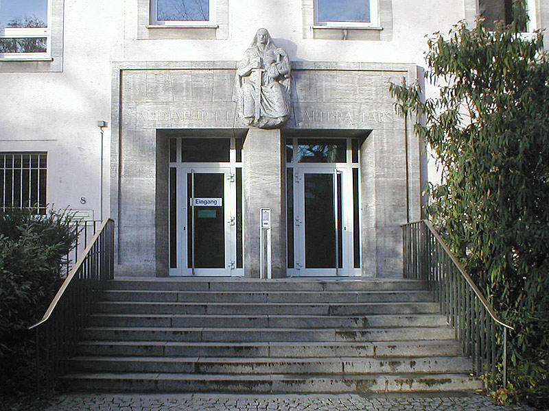 Portal des Landgerichts Heilbronn